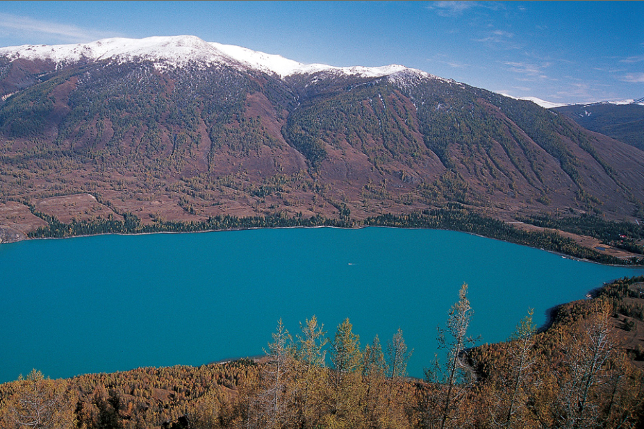 中文（中国大陆）: 喀纳斯湖，9月